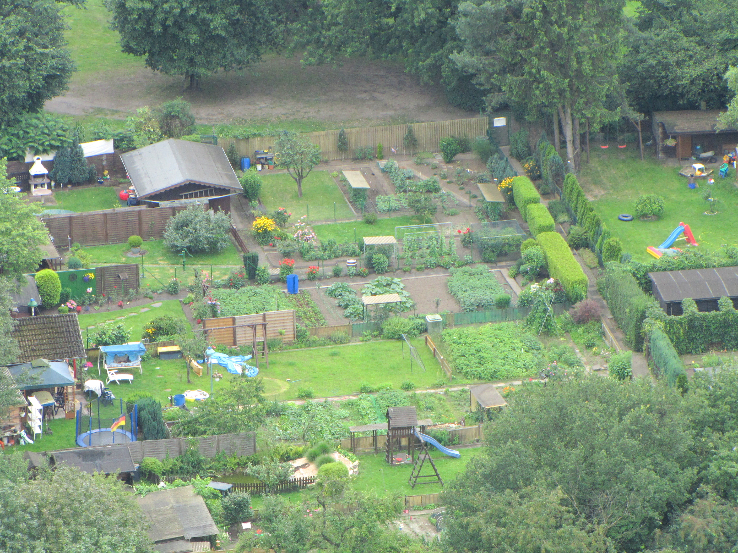 Aussicht vom Gasometer Oberhausen. Schrebergärten